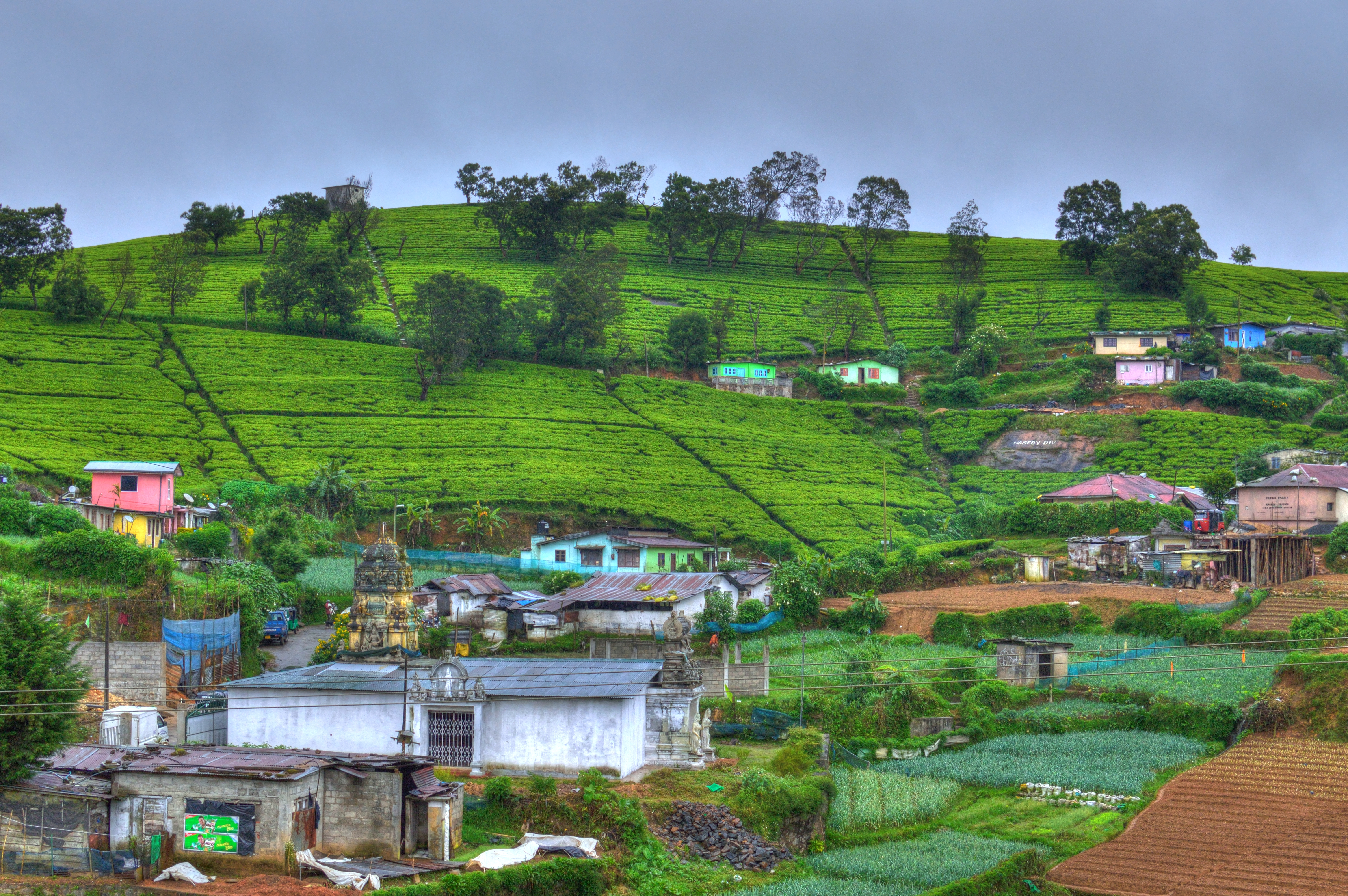 Mahagasthota, Nuwara Eliya, Sri Lanka